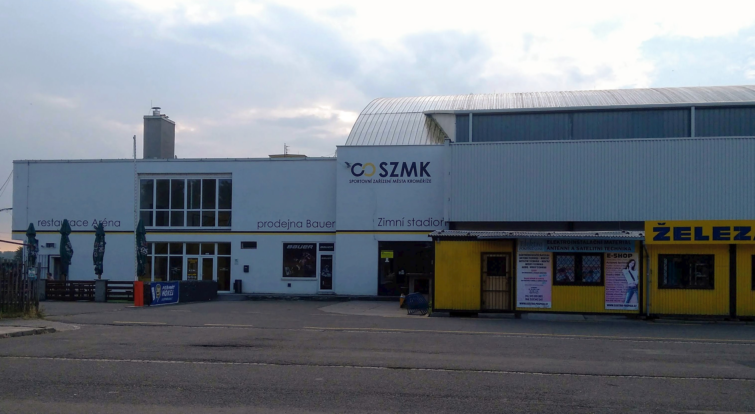 Zimní stadion Kroměříž, Obvodová 3474/11